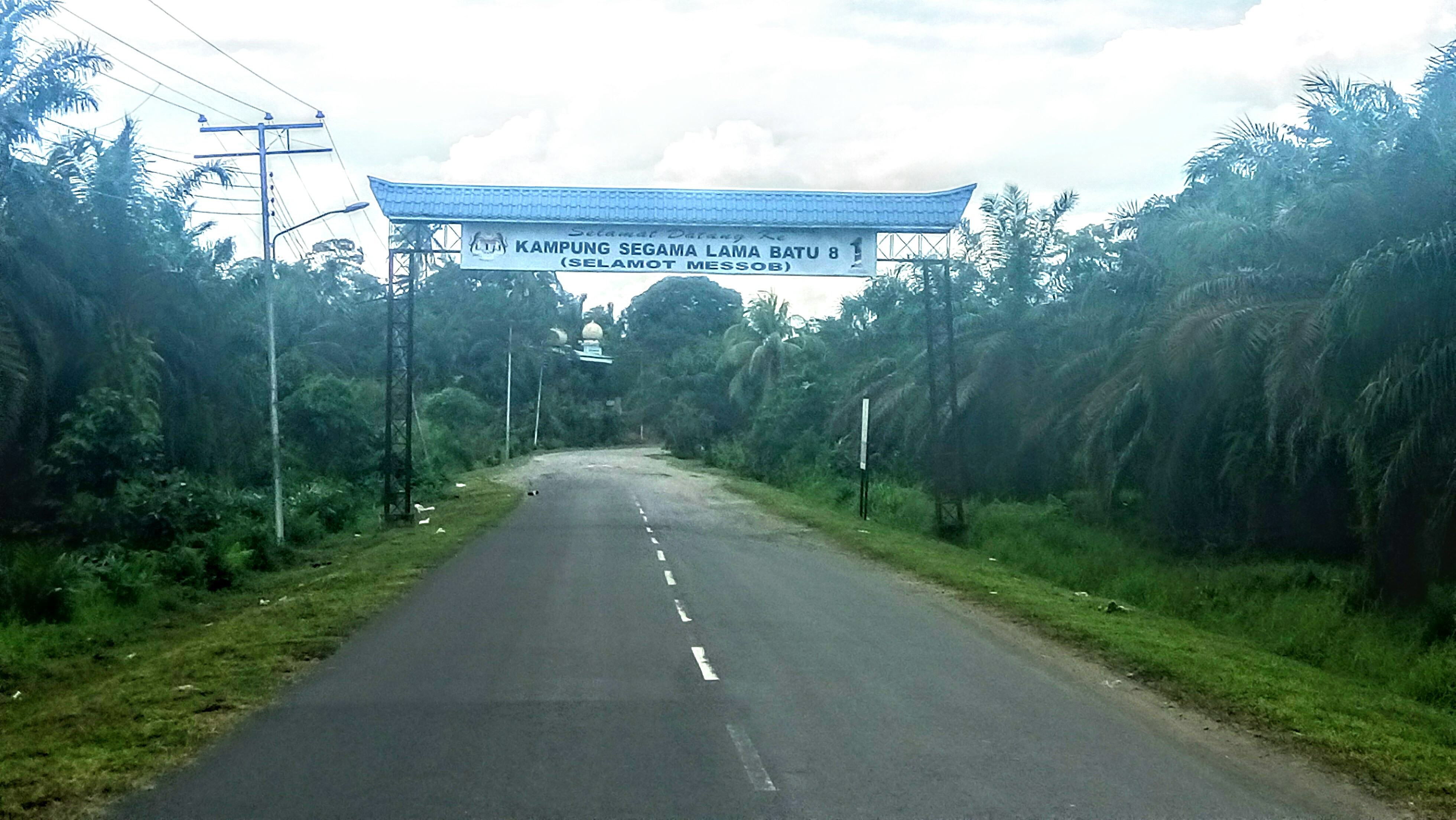 Kampung di Lahad Datu